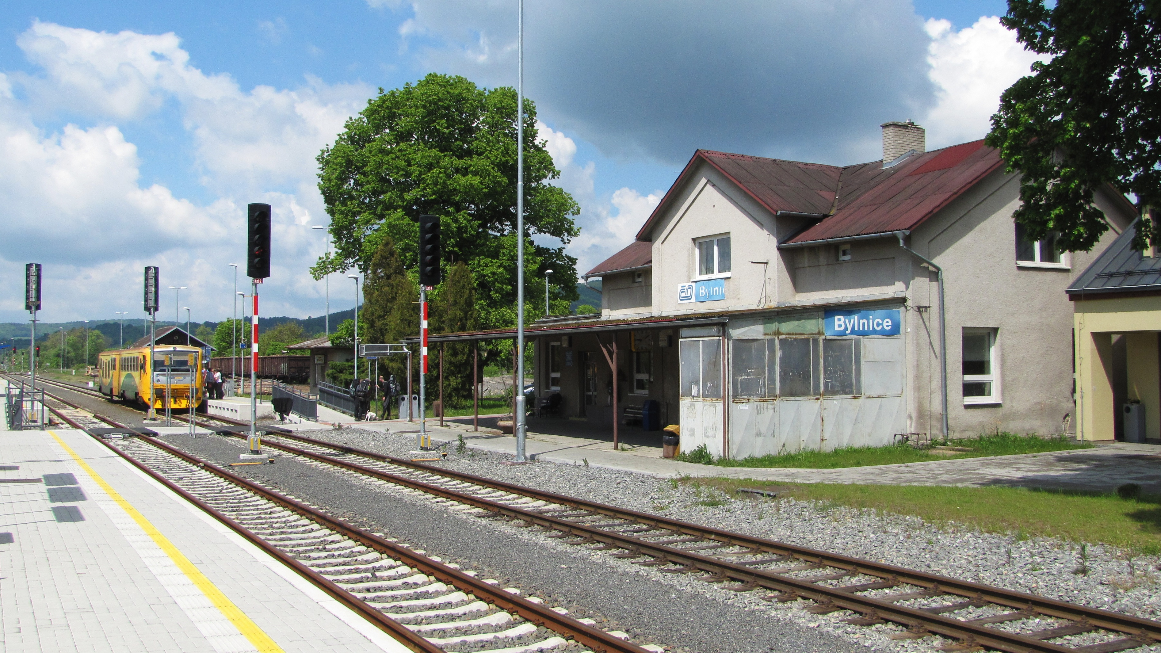 Železniční stanice Bylnice na Vlárské dráze